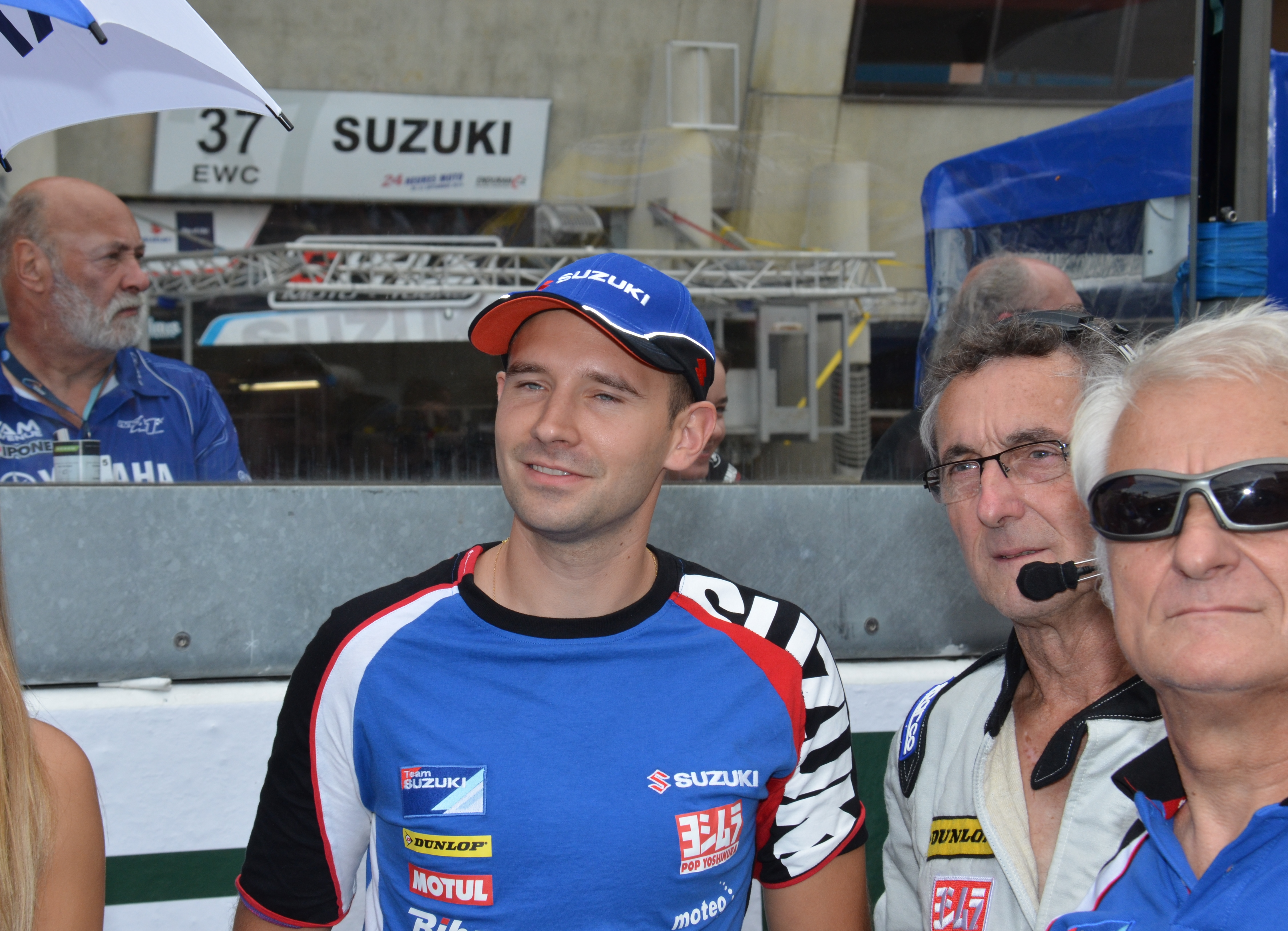 24 heures du Mans moto 2014.